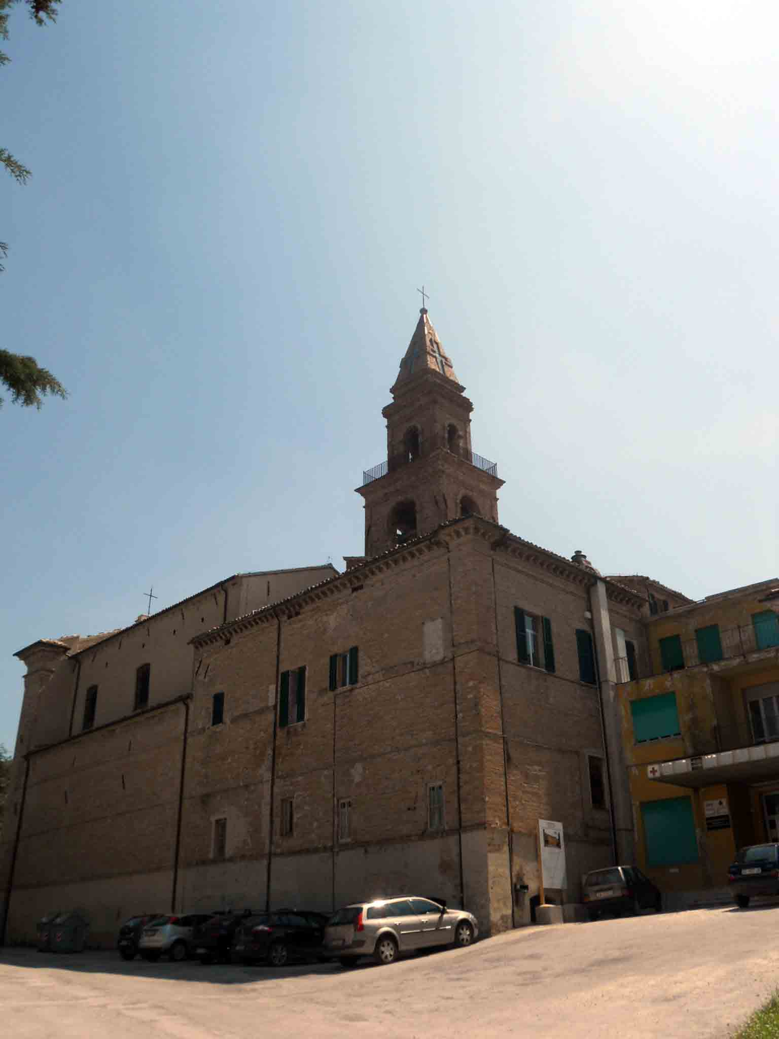 Campanile dell'ospedale, presidio della Brigata Maiella